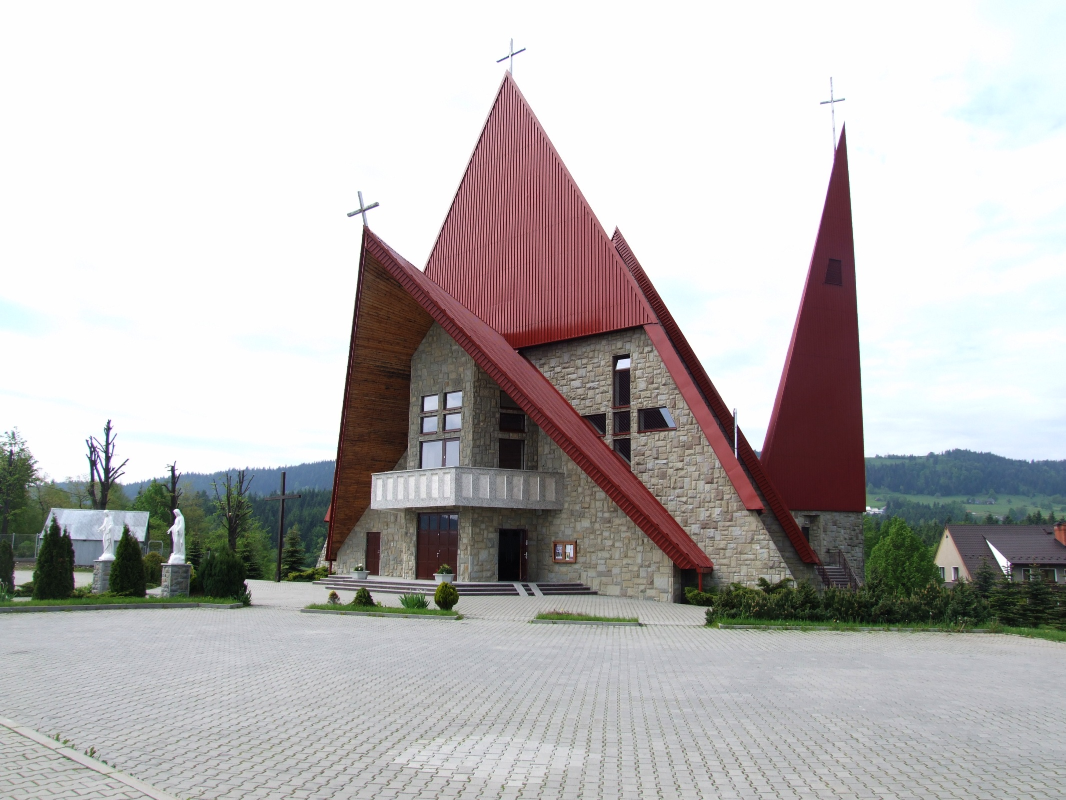 Kościół Matki Bożej Łaskawej w Siekierczynie